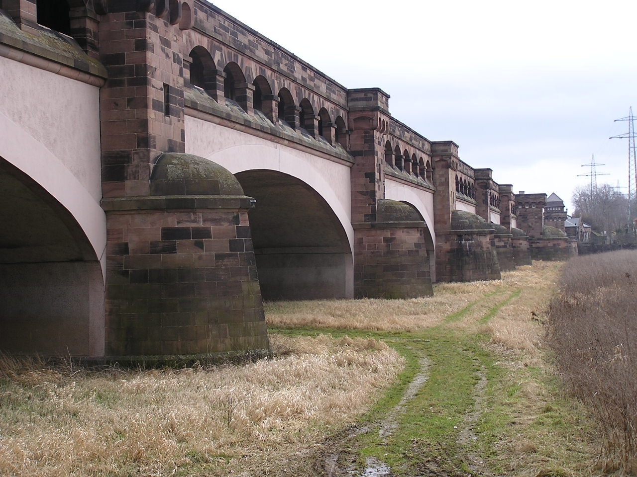 Die Alte Kanalbrücke des Wasserstraßenkreuzes Minden in Minden, Nordrhein-Westfalen, von Südwesten aus gesehen. Die 1914 fertiggestellte Trogbrücke ist 370 m lang und führt den Mittellandkanal über die Weser, die jedoch im Bild nicht abgebildet ist.